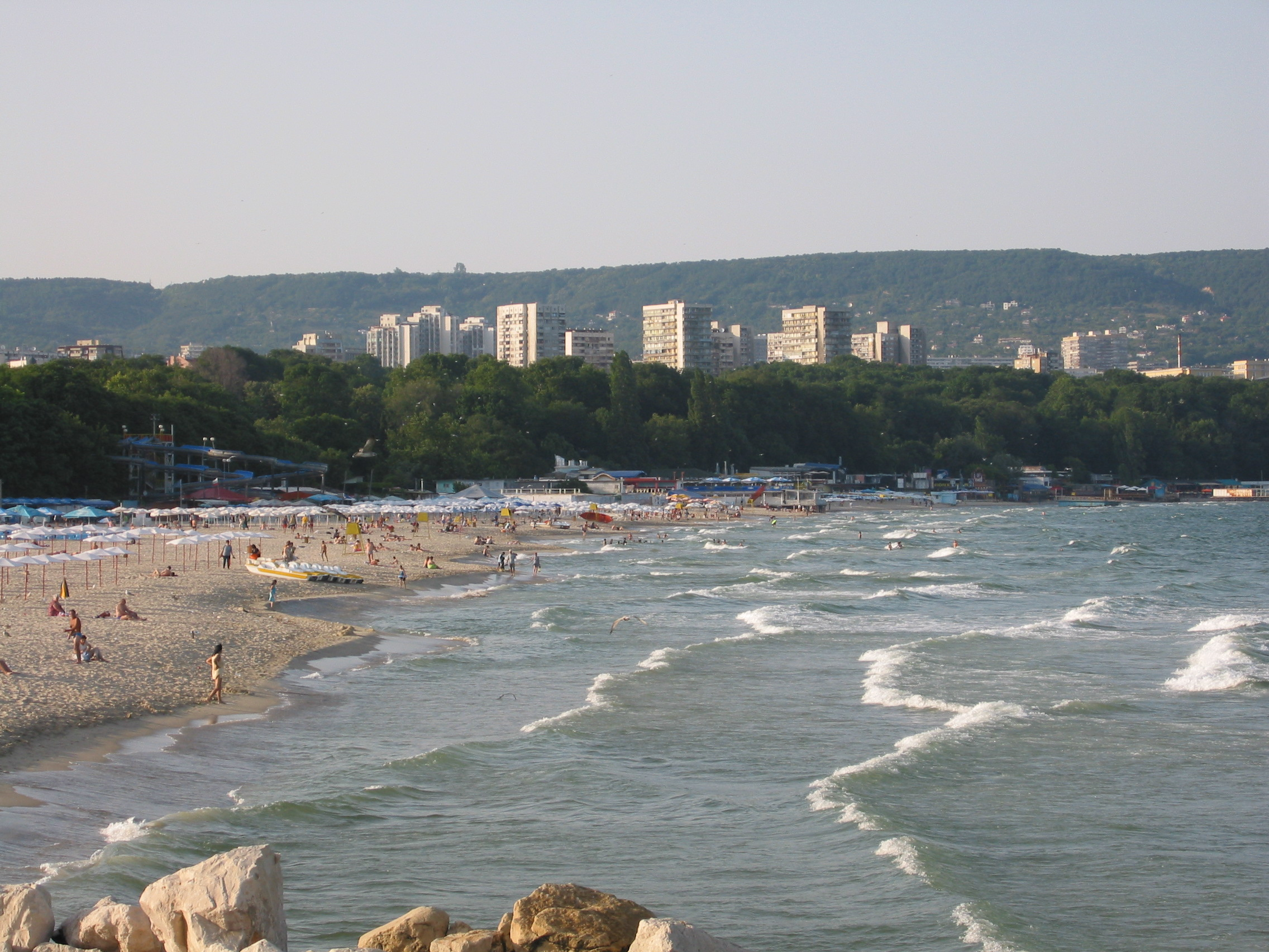 Varna, la plage. Photo prise par Harrieta171 le 11/07/04